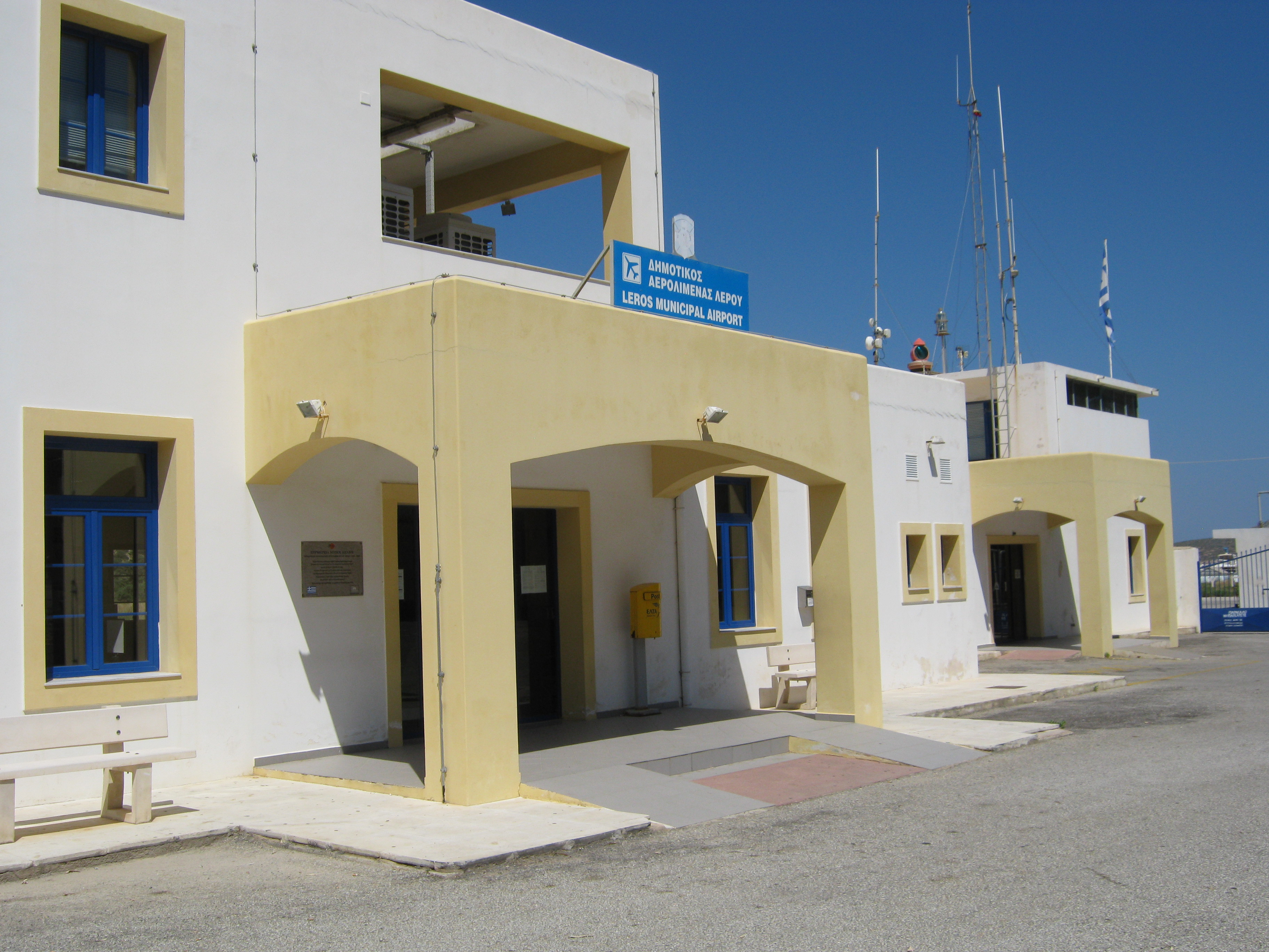 Leros Municipal Airport.